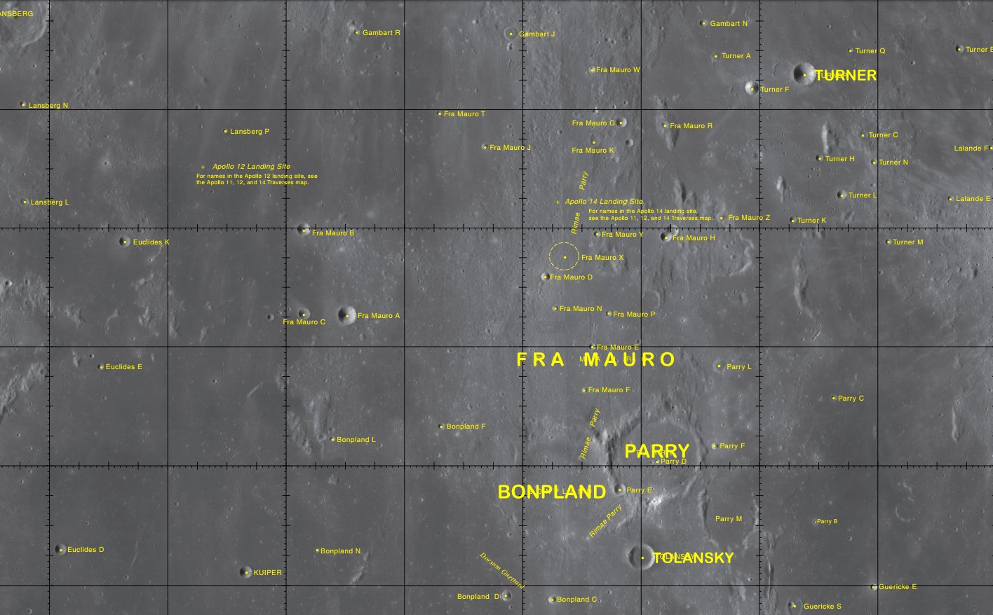 Cráter lunar Fra Mauro. Localización. (Imagen LROC)